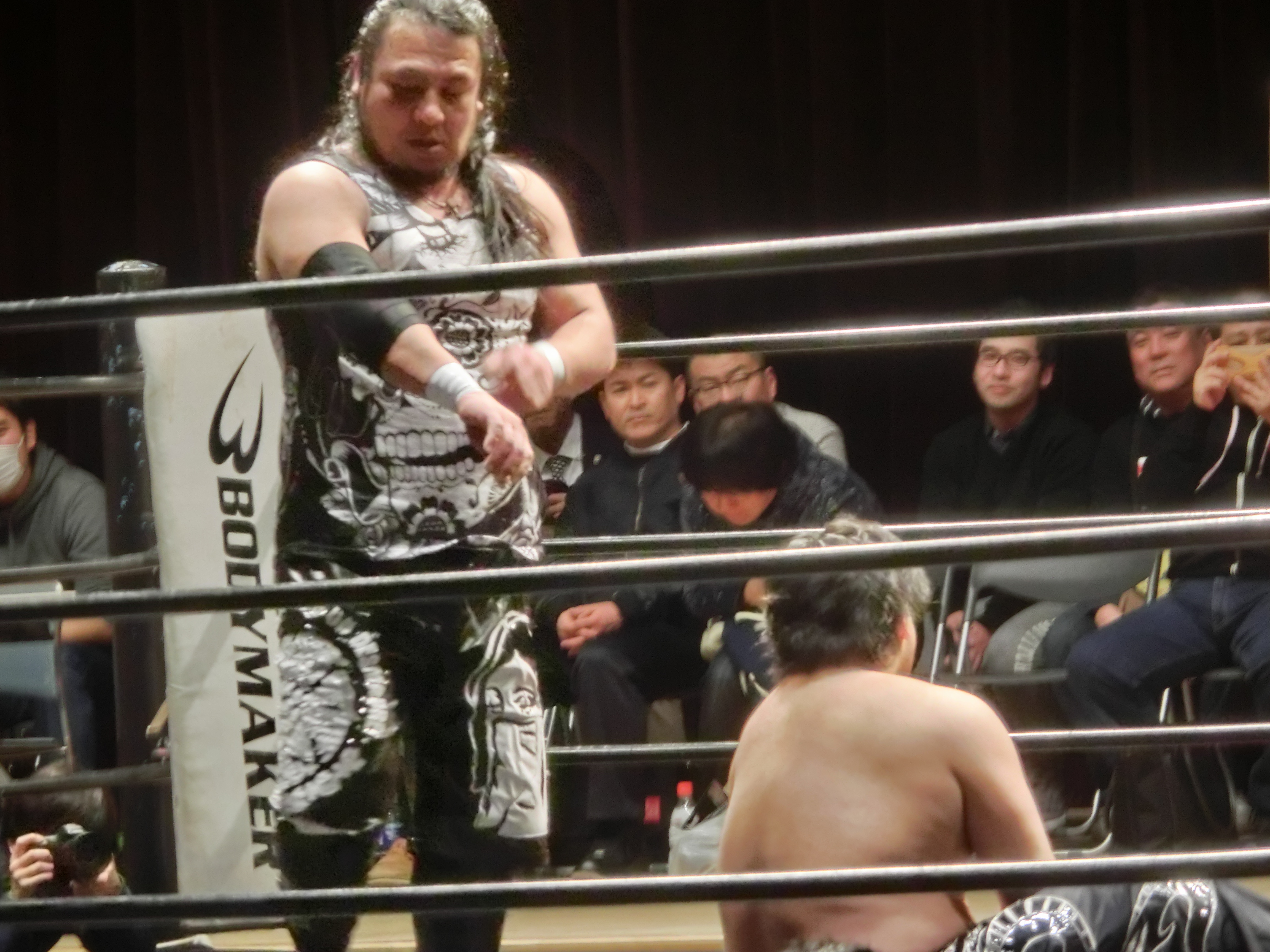 Masa Saito mourning performance